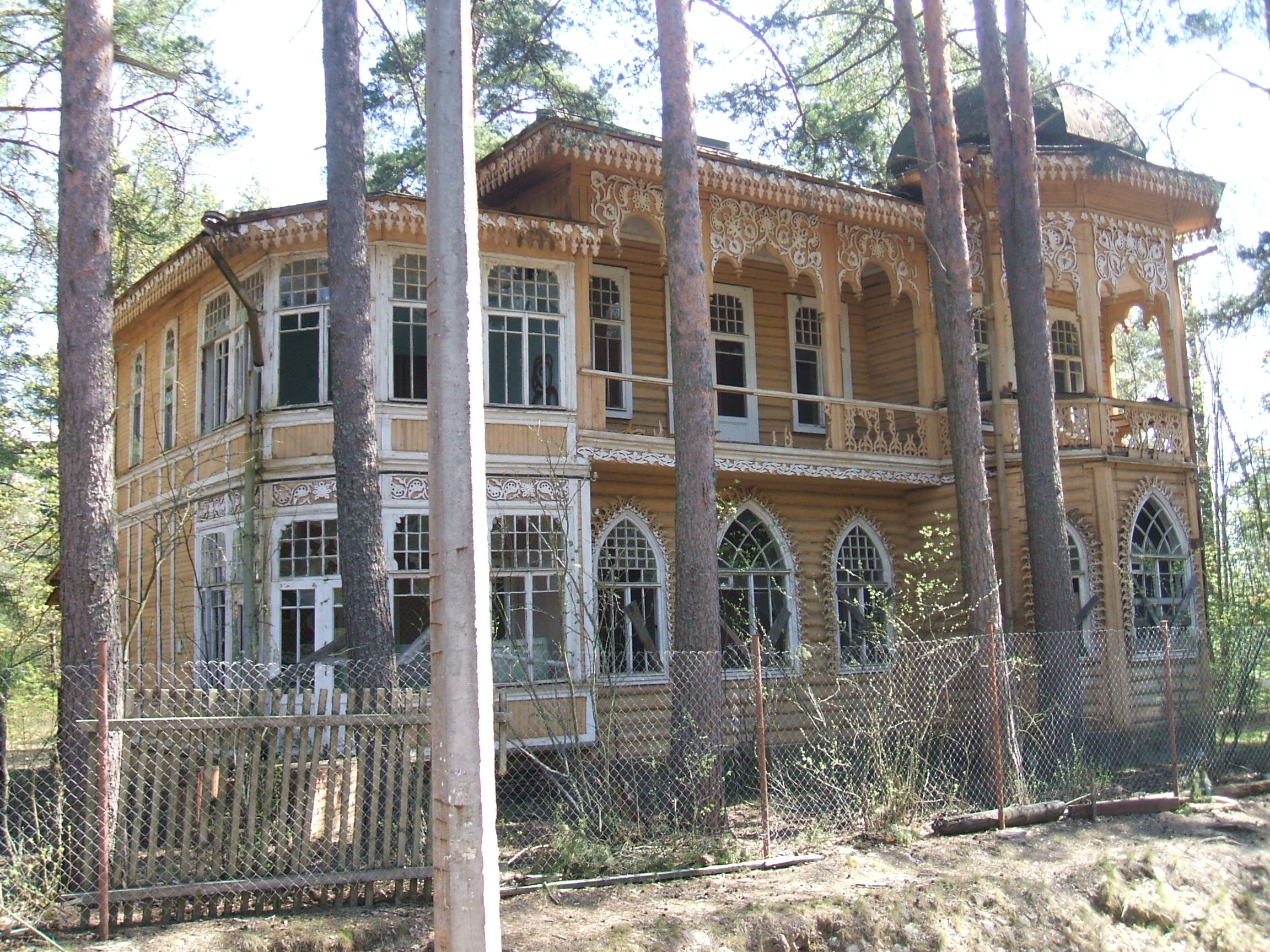 Дача Юхневича, Комарово